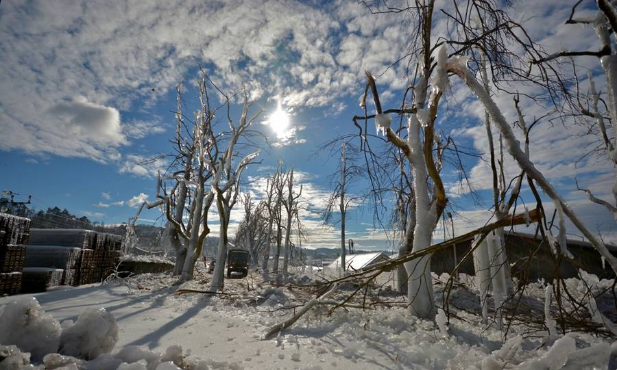 Vojska pri odpravljanju posledic žledu.